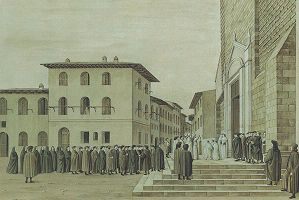 Sagra di masaccio, copia